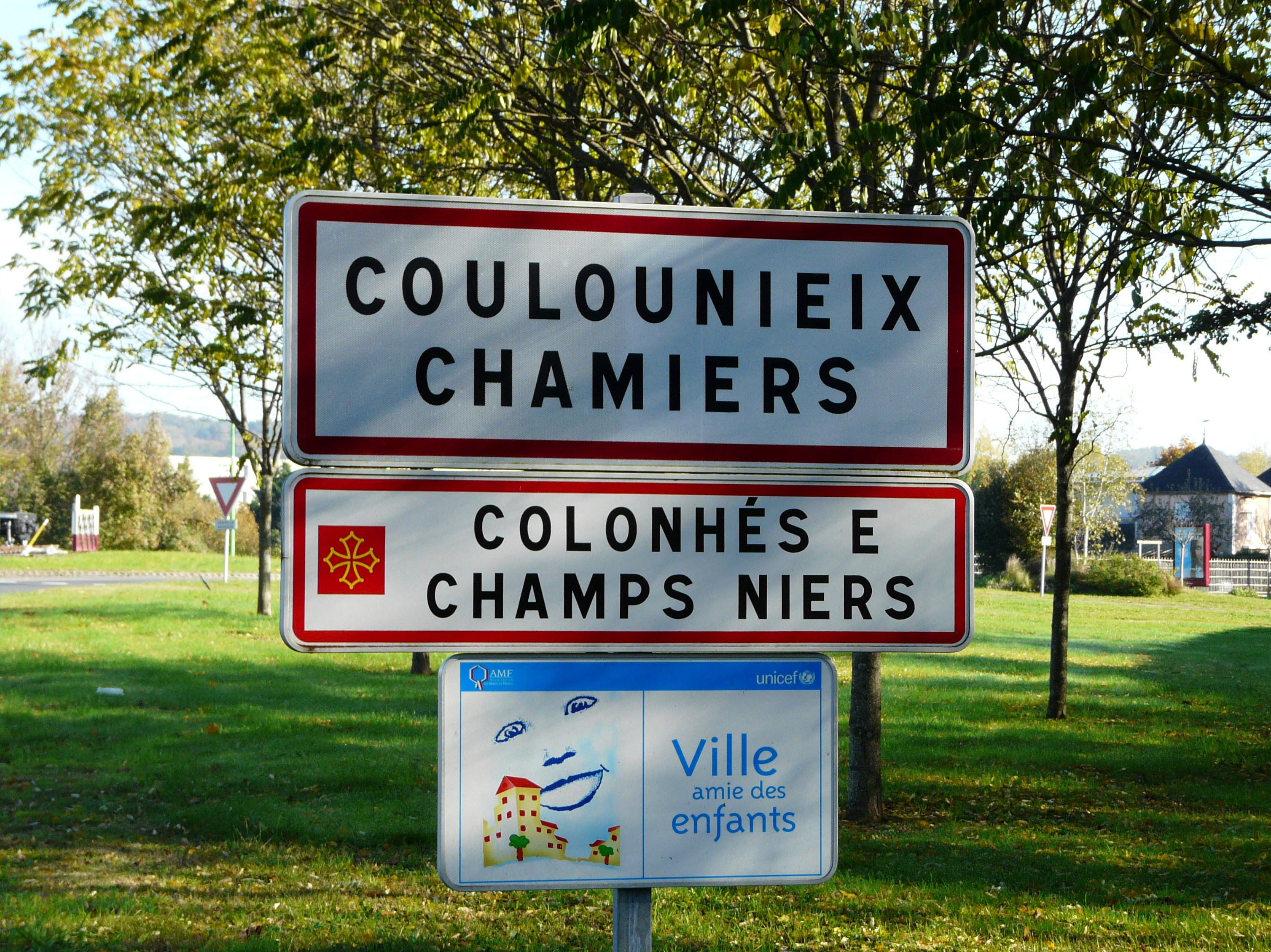 Panneau d'entrée en français et occitan à Coulounieix-Chamiers, Dordogne, France.